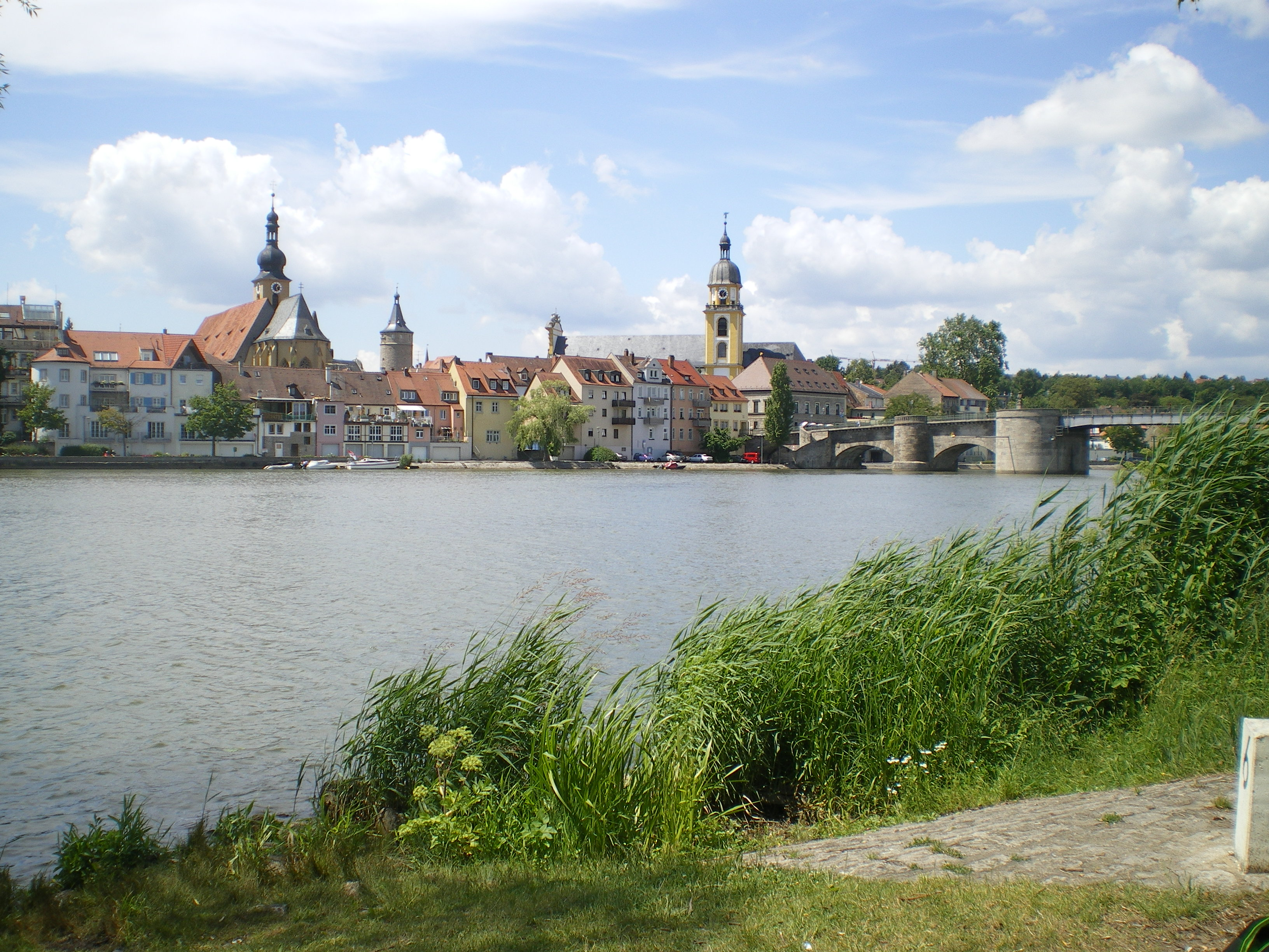 Altstadt von Kitzigen